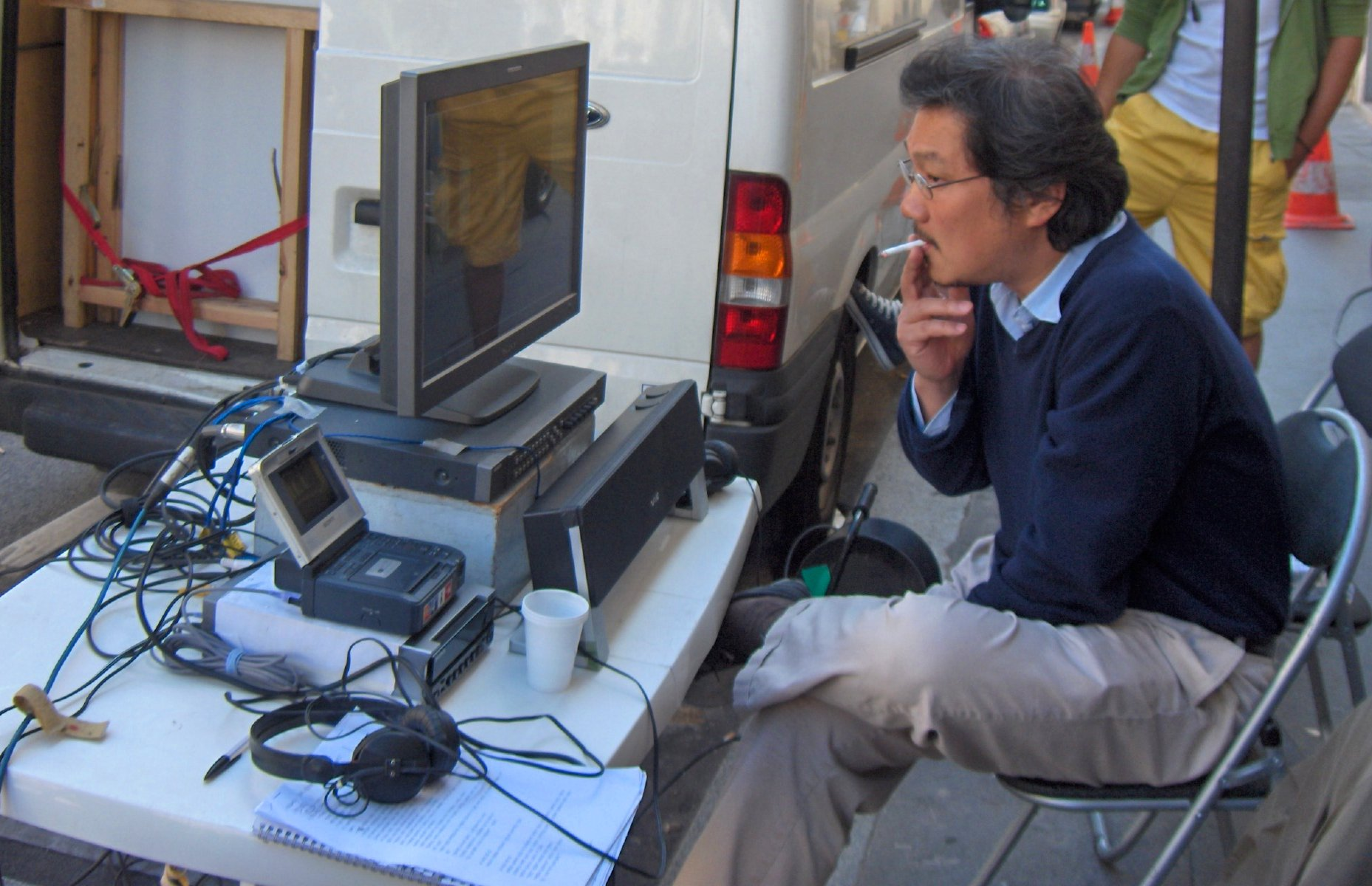 Hong Sang-soo sur le tournage de « Nuit et Jour » à Paris le 5 septembre 2007